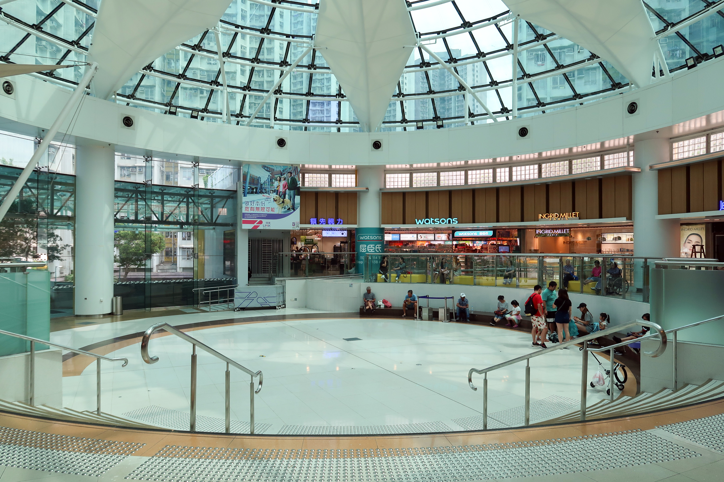 Fu Tung Plaza